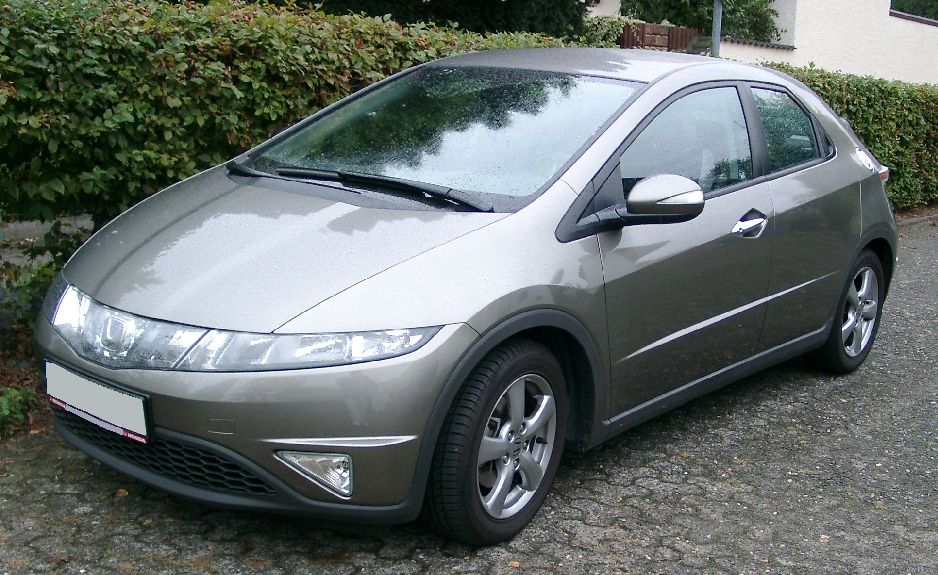 Honda Civic, 8. Generation